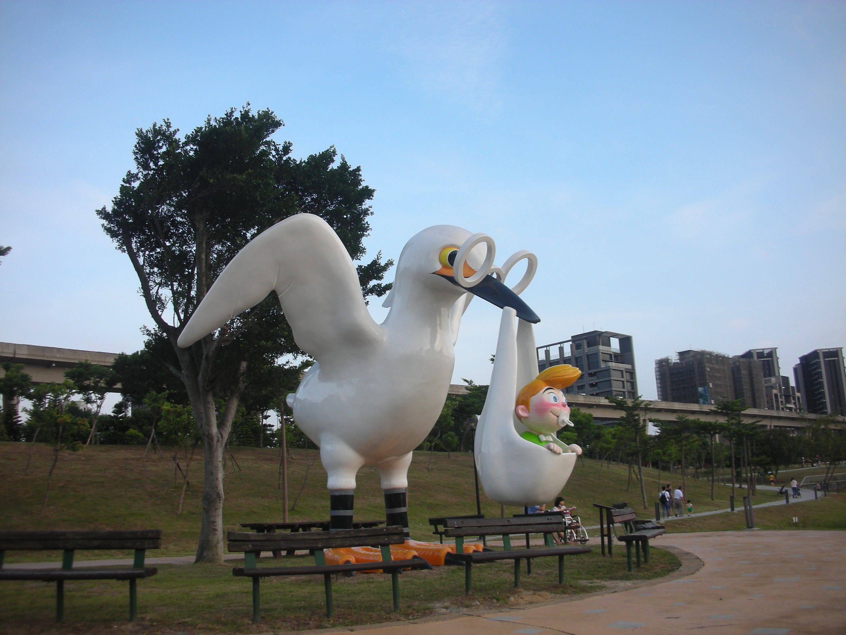 青埔青塘園「送子鳥」裝置藝術。